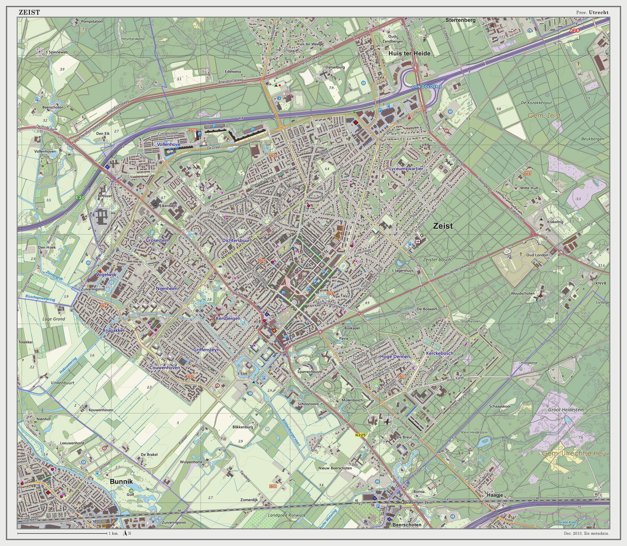 Topografische kaart van Zeist (woonplaats). Kaartbeeld samengesteld op basis van de GML open geodata van de Top10NL en Top25namen (Basisregistratie Topografie, Kadaster 30-nov-2013), o.b.v. Creative Commons BY licentie. Gebouwvlakken uit Open Geodata BAG extract (8-dec-2013). Wegen uit de Open Street Map (15-dec-2013). Samenstelling en kleurenschema: Jan-Willem van Aalst, met QGIS2 en Adobe Photoshop. Zie ook de Legenda.